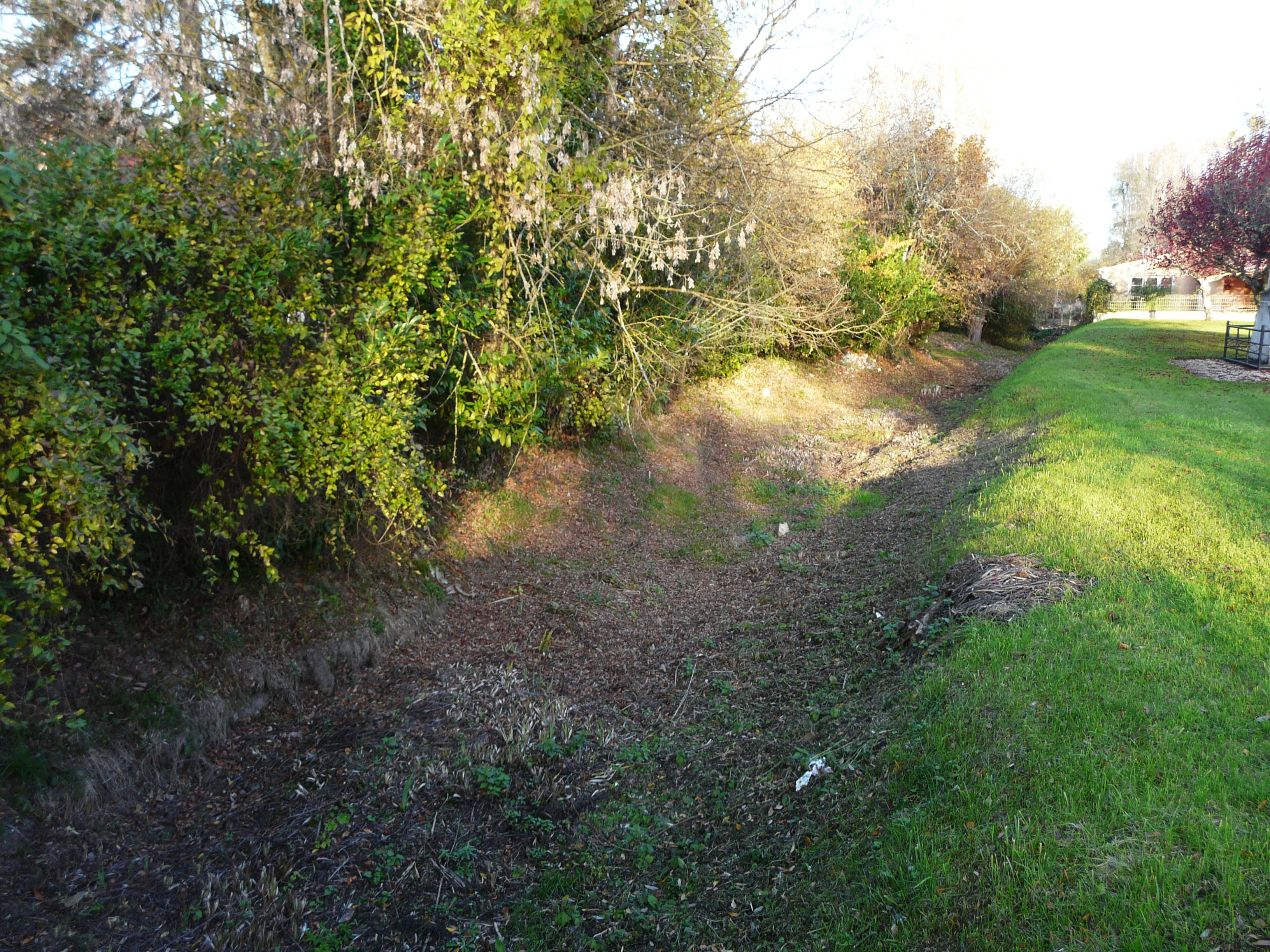 Le lit du Manoire à sec, Saint-Crépin-d'Auberoche, Dordogne, France.